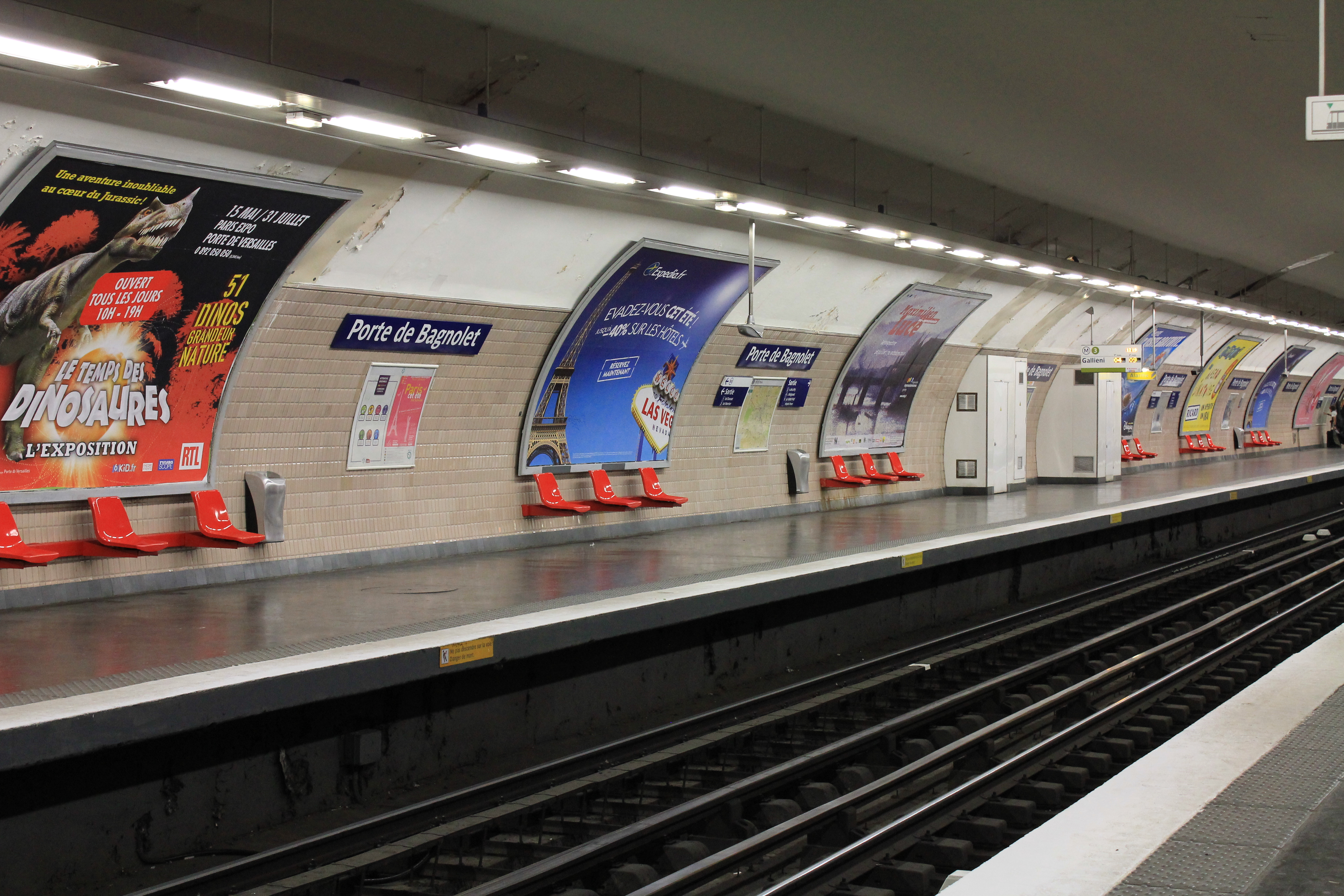 Joseph-André Motte (Français, 1925-2013): siège "Motte", RATP 1973, coque en tôle 10/20 emboutie et émaillée sur rails métalliques, station Porte de Bagnolet de la ligne 3 du métro de Paris, France.